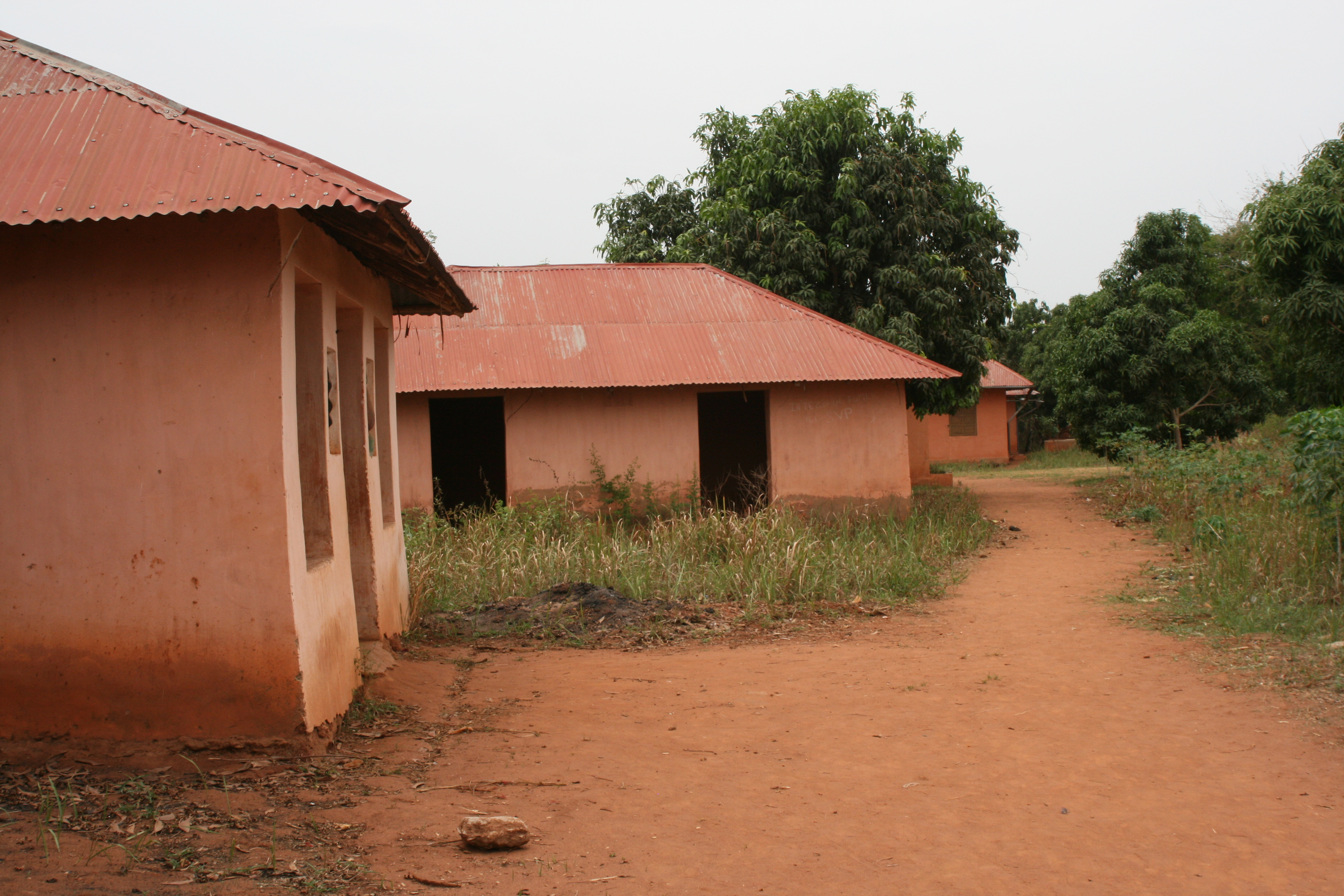 Königspalast in Abomey, Benin. Weltkulturerbe.